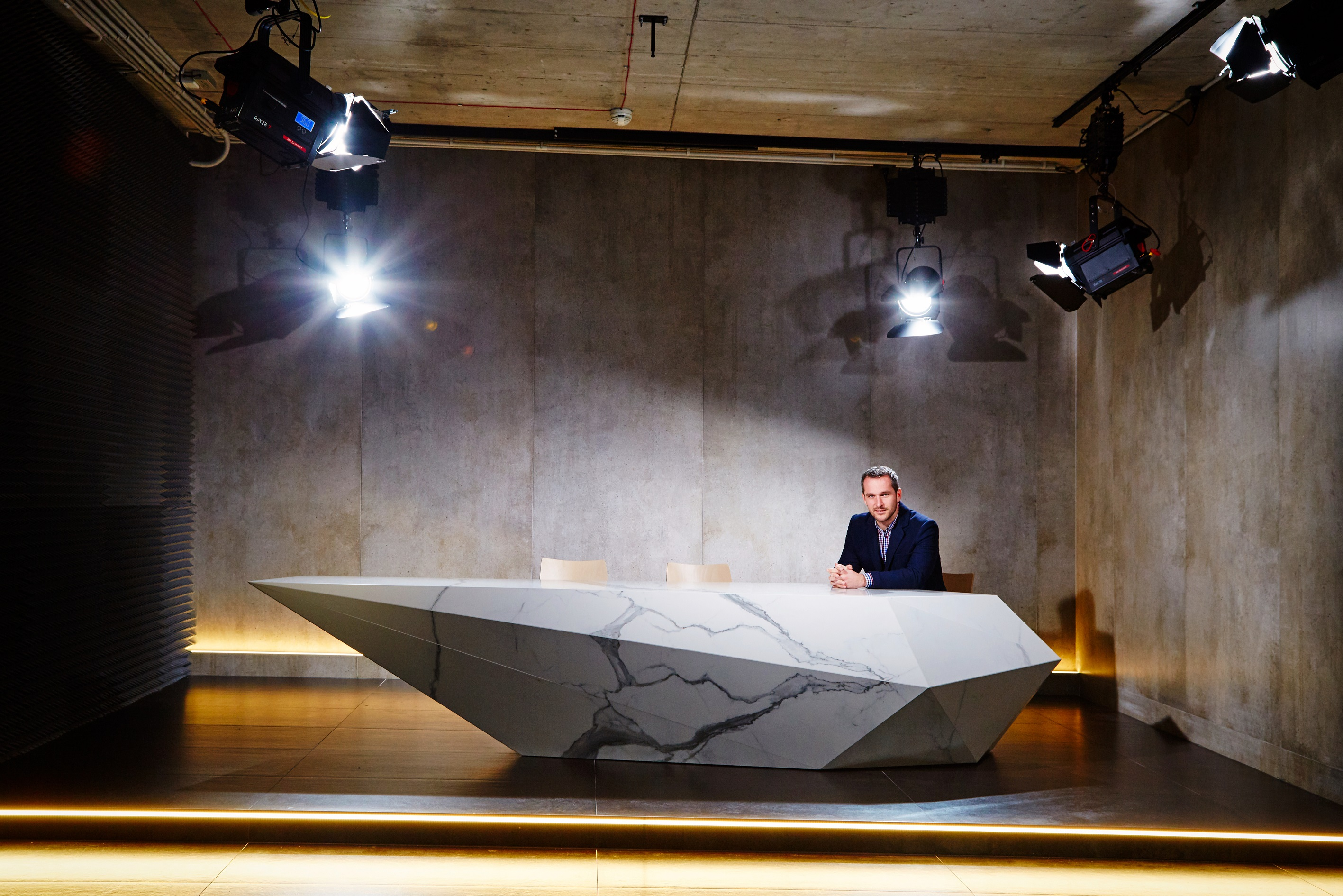 Studio